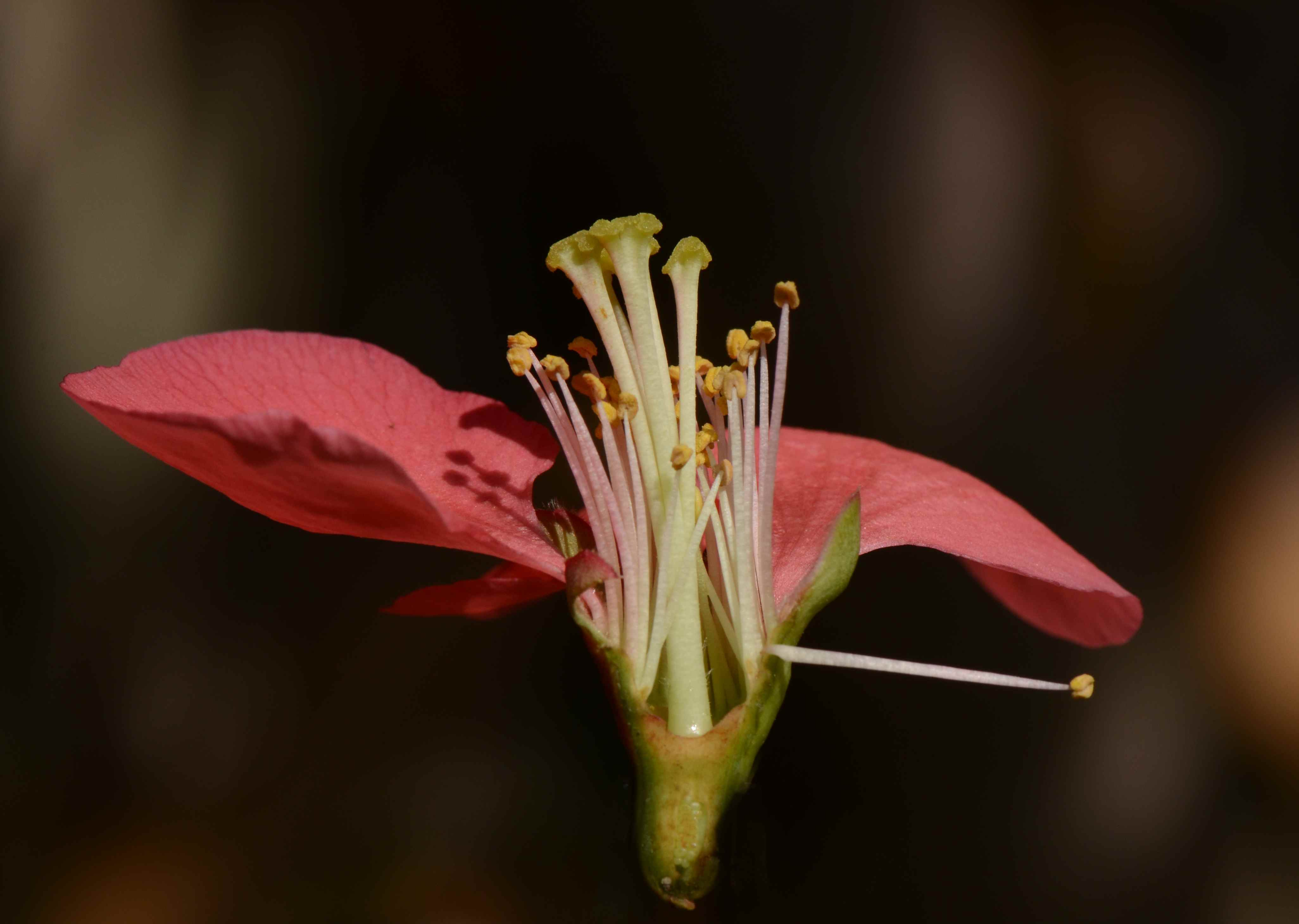 Section d'une fleur de cultivar de Chaenomeles